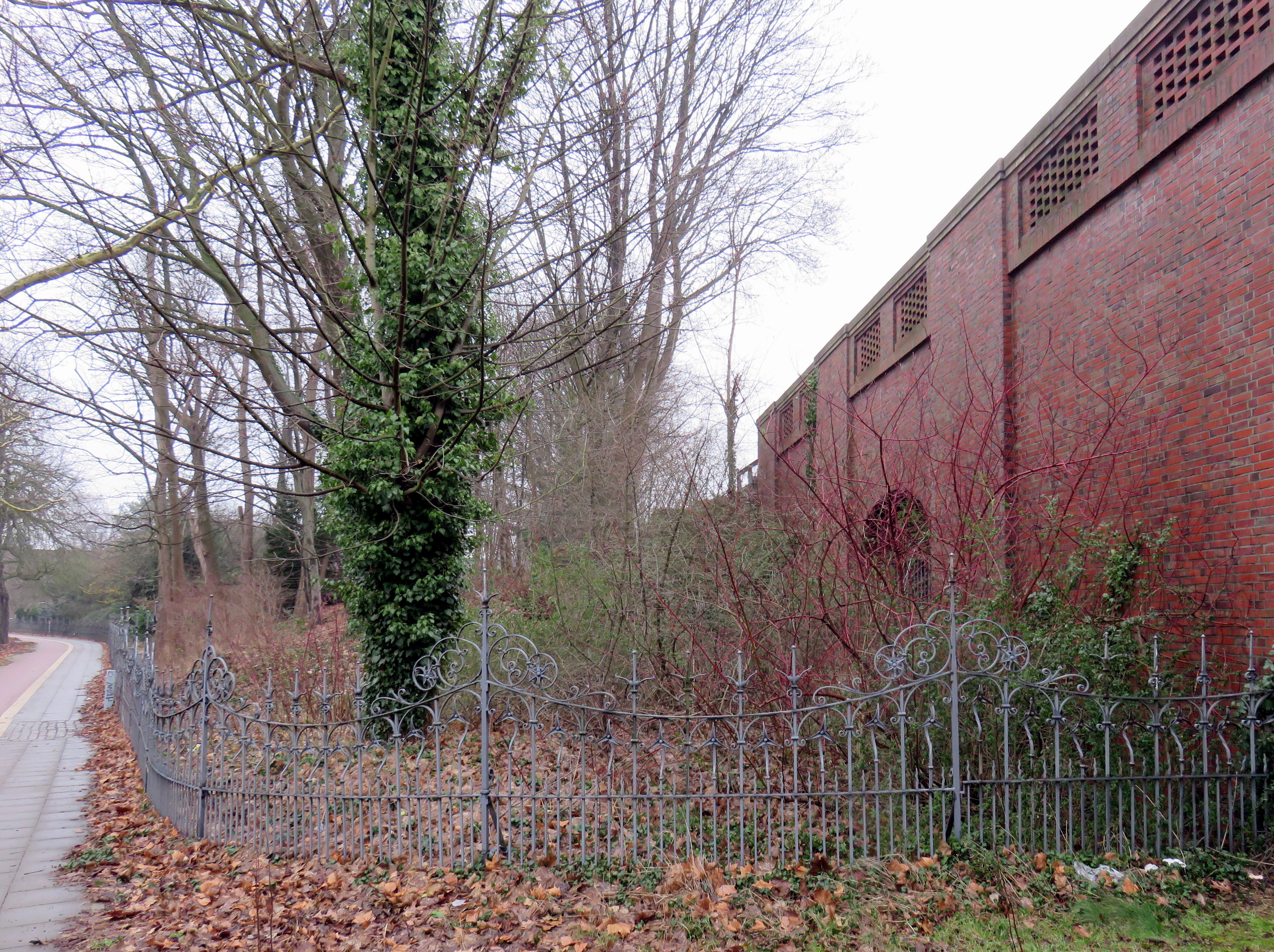 Fuhlsbüttler Straße 792: ehemalige Wohnung des damaligen Friedhofsdirektors Wilhelm Cordes. Von hier hatte er einen (abgekürzten) Arbeitsweg durch den „Cordes-Tunnel“ im S-Bahn-Damm zum Friedhof Ohlsdorf.